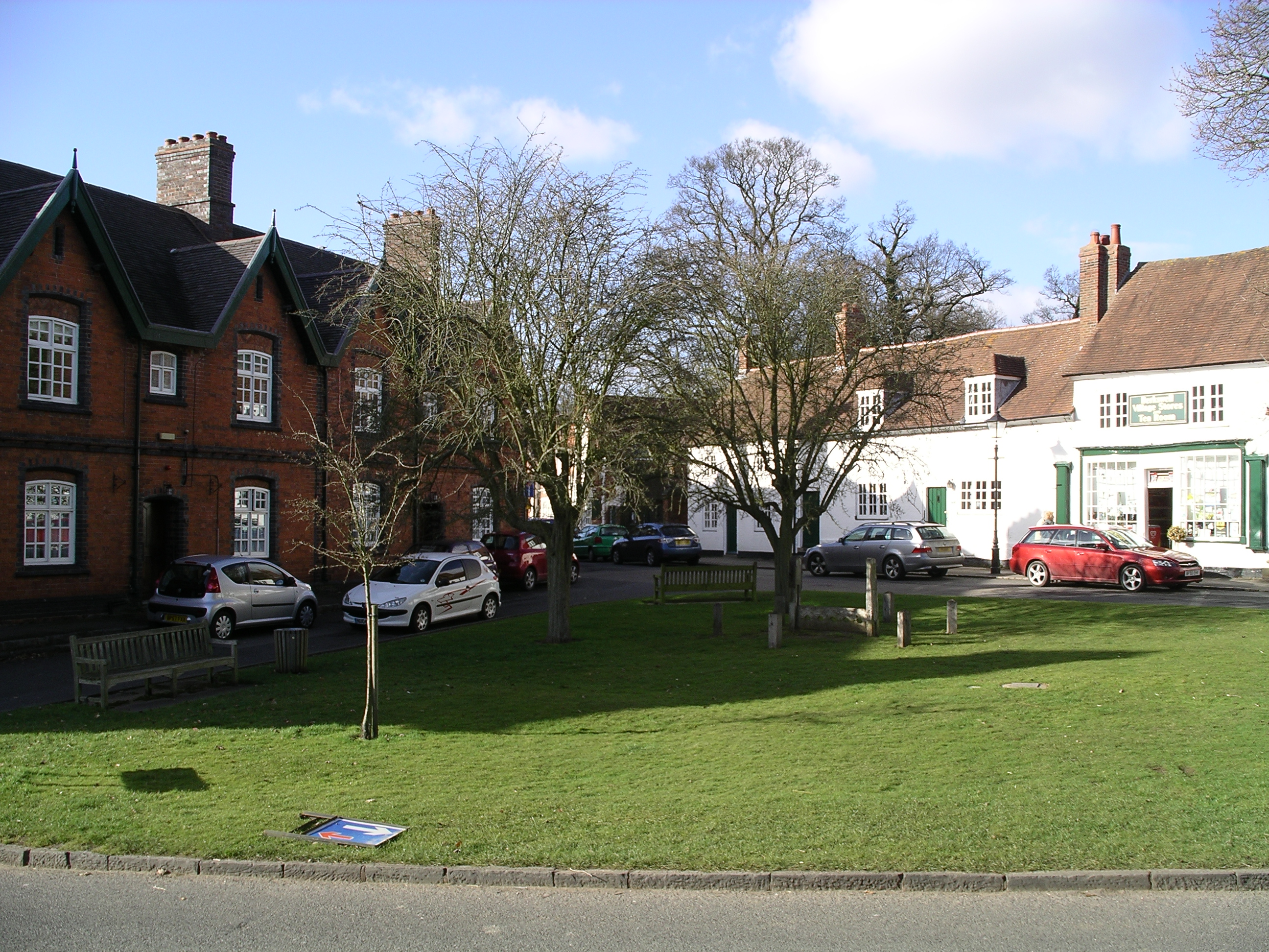 Berkswell village green, Warwickshire, England.